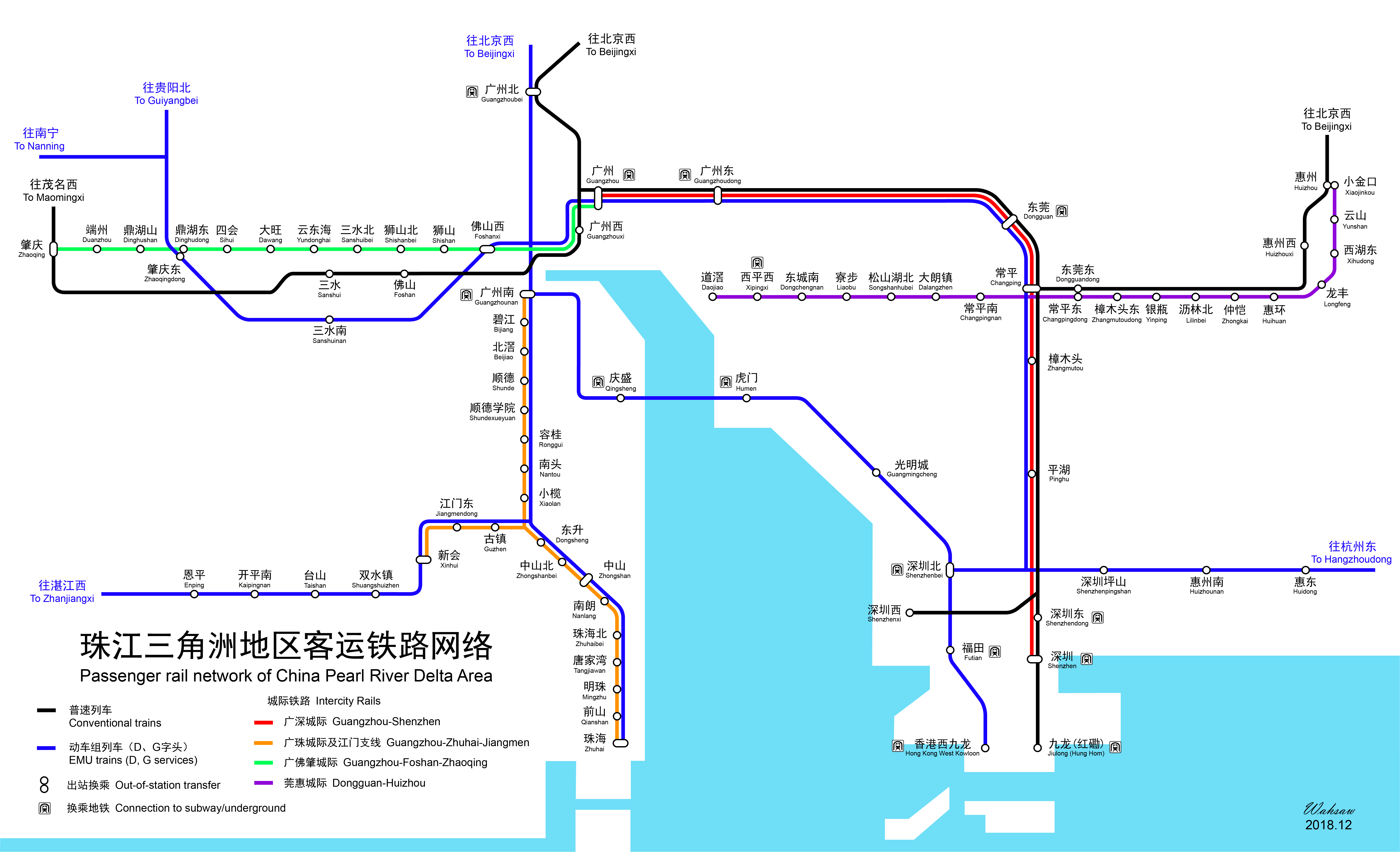 中国珠江三角洲地区客运铁路网络示意图（2018.10）